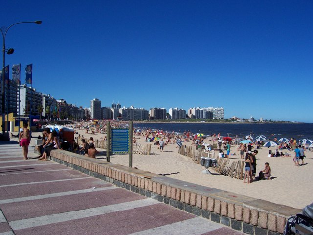 Vista de la playa Pocitos, enero de 2006, Montevideo, Uruguay Federico Corral aka Shant